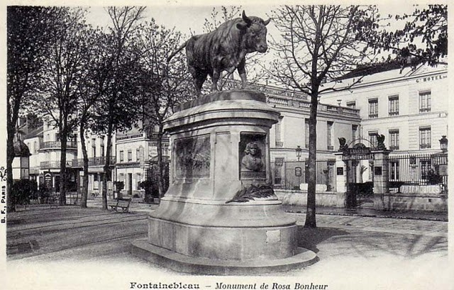 Le monument à Rosa Bonheur, érrigé en 1901 à Fontainebleau (Seine-et-Marne), détruit en 1942. Carte postale vers 1920, photographe inconnu. La statue est un agrandissement d'une statuette réalisée par Rosa Bonheur.